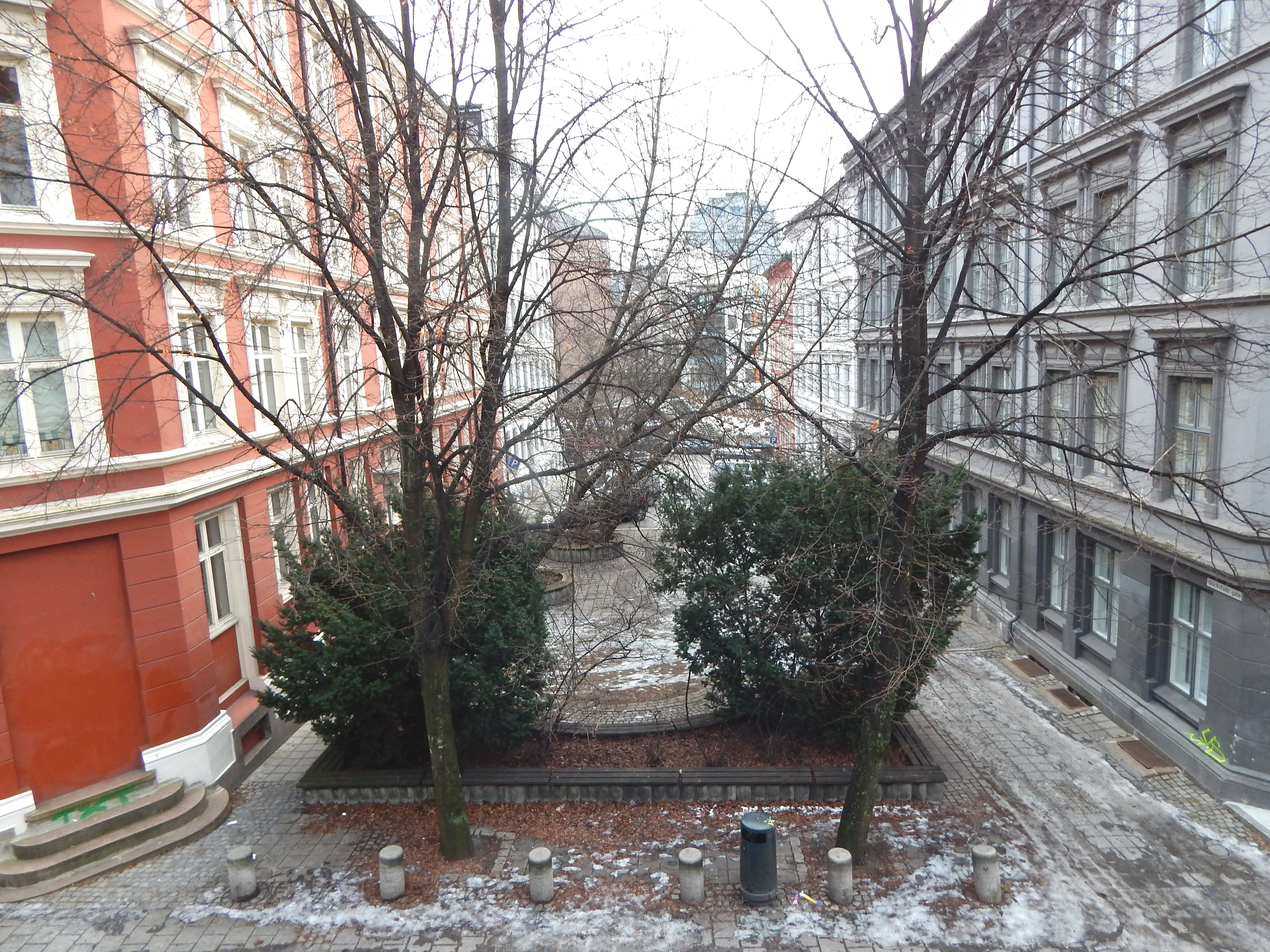 Nedre del av Glückstads gate